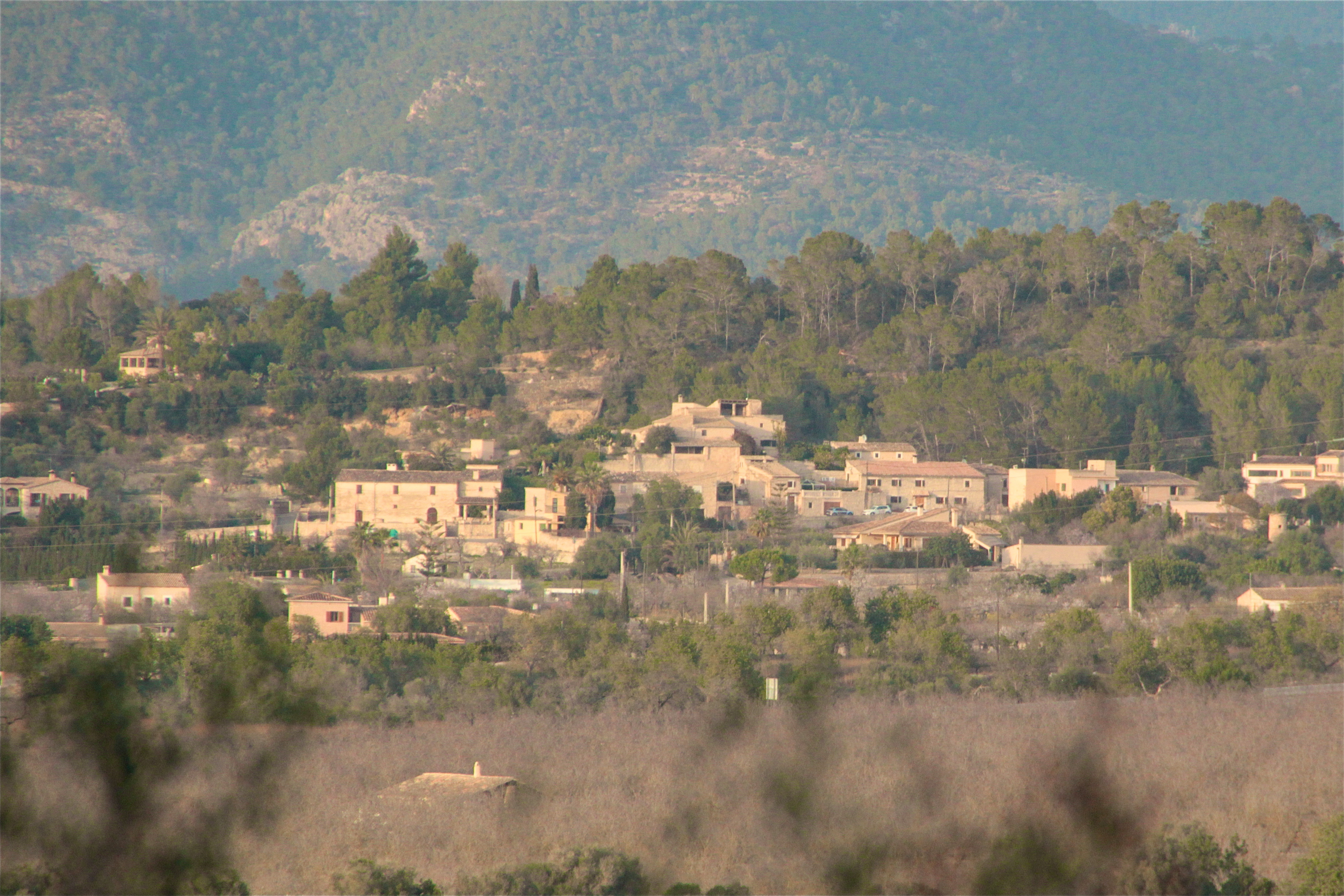 Marratxinet3